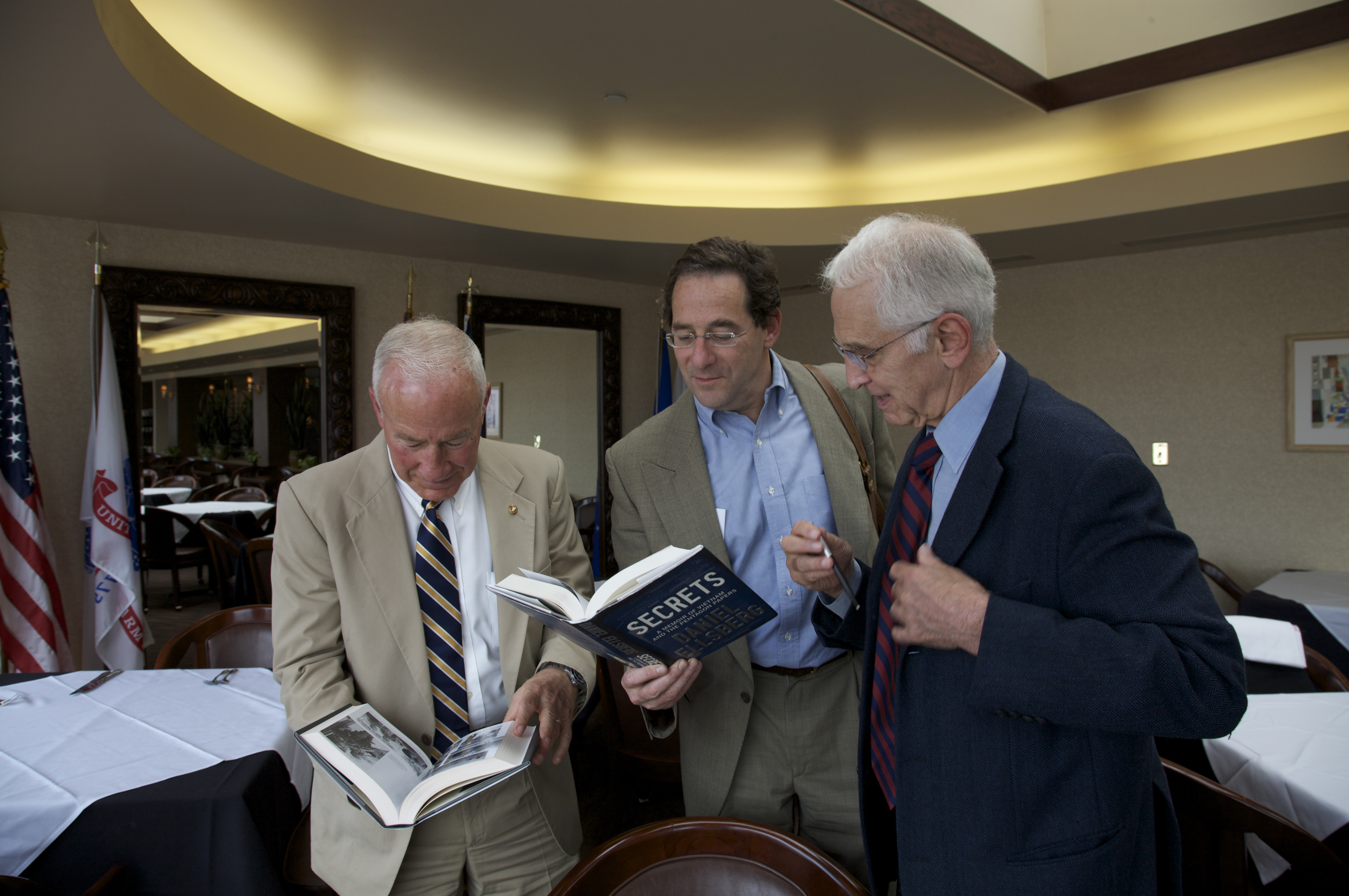 Daniel Ellsberg, Mike Myatt, & Robert Rosenthal